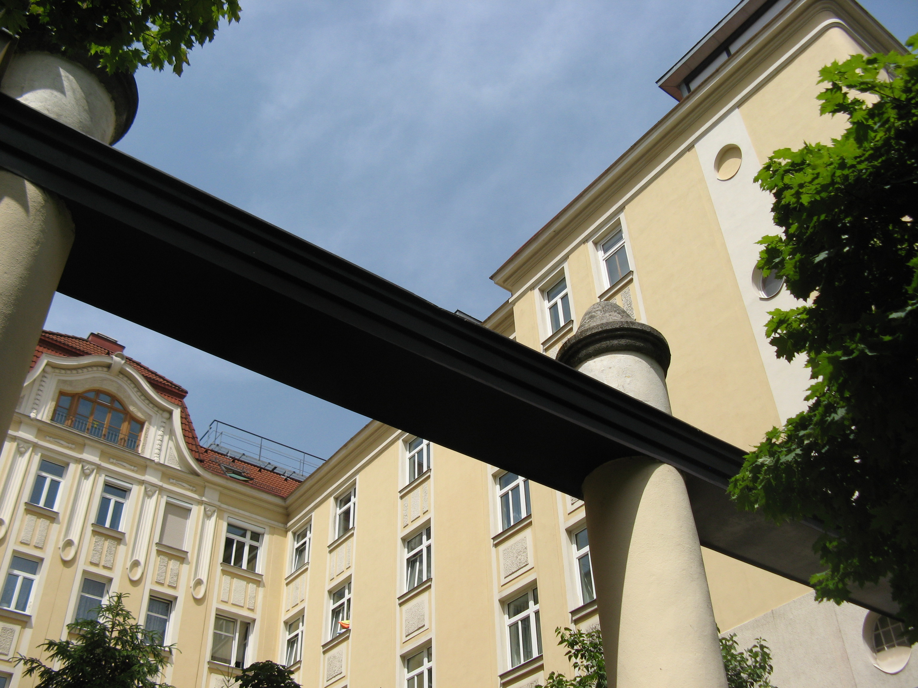 Straßenhof (1912) von Karl Kassner, Neusetzgasse 4-8, Wien-Favoriten